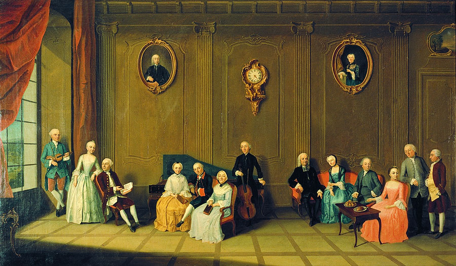 Bildnis der Familie des Johann Rudolf Stettler (1696-1757), Landvogt nach Saanen 1737, Kleiner Rat 1749, Venner 1756, das Bild ist um 1755 entstanden. Die Familie Stettler ist im Salon des Stettler-Hauses (später Bondeli-Haus) am Münzrain in Bern dargestellt. Von links nach rechts: Oberst Stettler von Zofingen; Frau Porta, früher Witwe Wyttenbach geb. Stettler; Herr Stettler, seither Seckelmeister; Frau Morell, geb. Stettler; Samuel Stettler, seither Schaffner im Interlakenhaus; Frau Stettler geb. Wyttenbach; Herr Stettler von Reitenau; Herr Stettler, seither Venner; Frau Steiger von Münsingen geb. Stettler; Herr Morell, Amtsschreiber zu Wangen; Frau Stettler geb. Herbort, Herr Steiger von Münsingen, Venner; Herr Porta [von Lausanne]. zit. nach Eduard Stettler, in: Les Portraits Bernois I, S. Nr. 41.